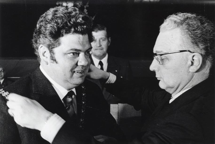 Vonhoff, H.J.L. (VVD). Installatie van H.J.L. Vonhoff als de nieuwe burgemeester van Utrecht. Loco-burgemeester Hartevelt (rechts) doet hem de nieuwe ambtsketting om. Nederland, Utrecht, 19 augustus 1974.